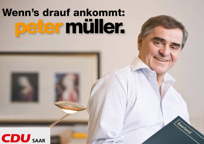 Wenn's drauf ankommt: peter müller. CDU Saar Abbildung: Foto Kommentar: Hohlkammerplakat; Großflächen-Abschlussplakat Plakatart: Kandidaten-/Personenplakat mit Porträt Künstler_Grafiker: Maksimovic & Partners Agentur für Werbung und Design, Saarbrücken Auftraggeber: CDU Saar Objekt-Signatur: 10-011 : 1704 Bestand: Landtagswahlplakate Saarland (10-011) GliederungBestand10-18: Landtagswahlplakate Saarland (10-011) » CDU Lizenz: KAS/ACDP 10-011 : 1704 CC-BY-SA 3.0 DE